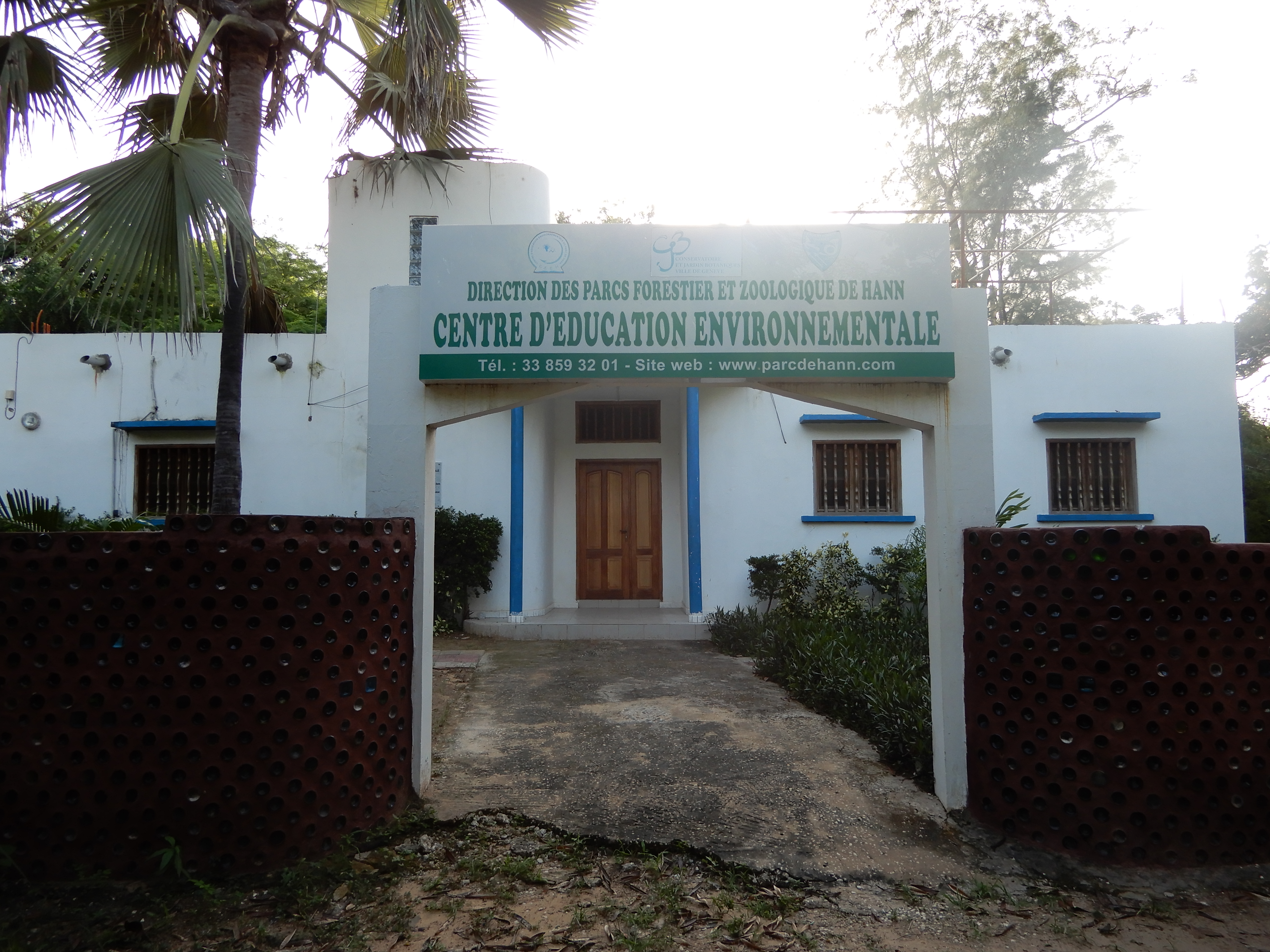 Entrée dans le Centre d'éducation environnementale du Parc forestier et zoologique de Hann